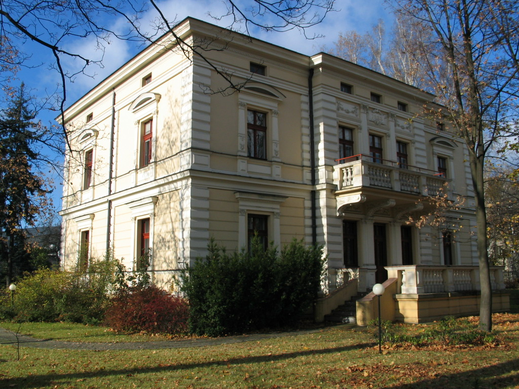 Willa Zygmunta Richtera w Łodzi